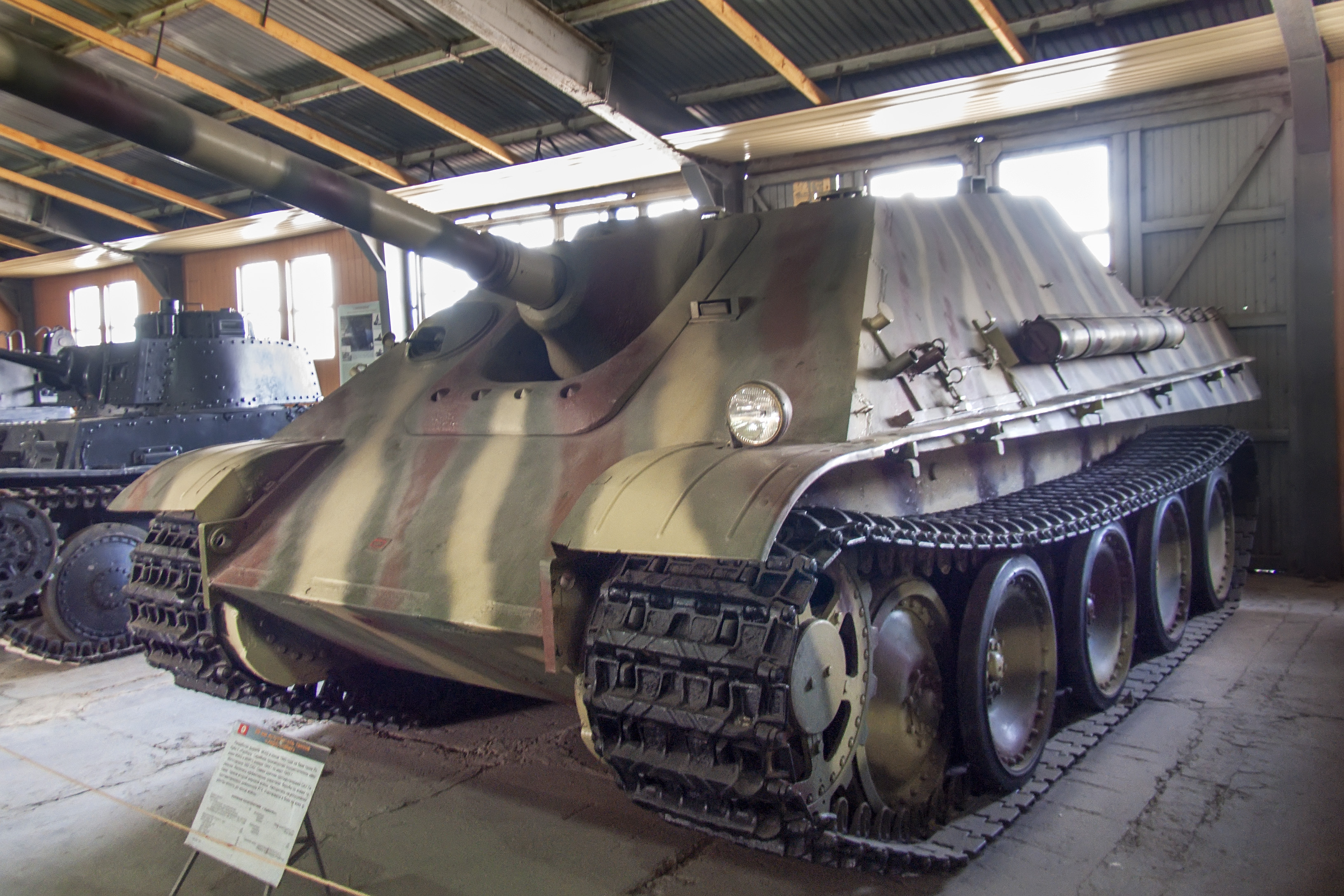 Противотанковая самоходная установка «Ягдпантера» (SdKfz 173) в Центральном музее бронетанкового вооружения и техники в Кубинке.